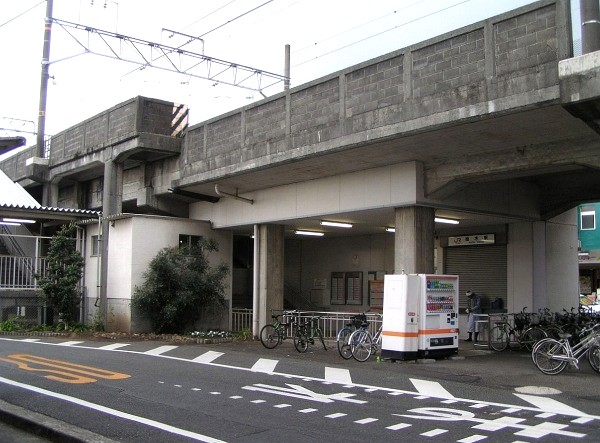 Yunoki Station on Minobu Line